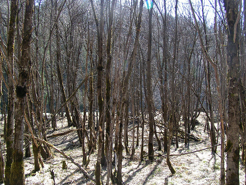 Alnus incana - Betulaceae